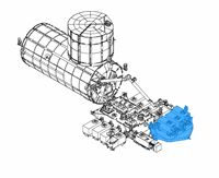 Външна товарна платформа